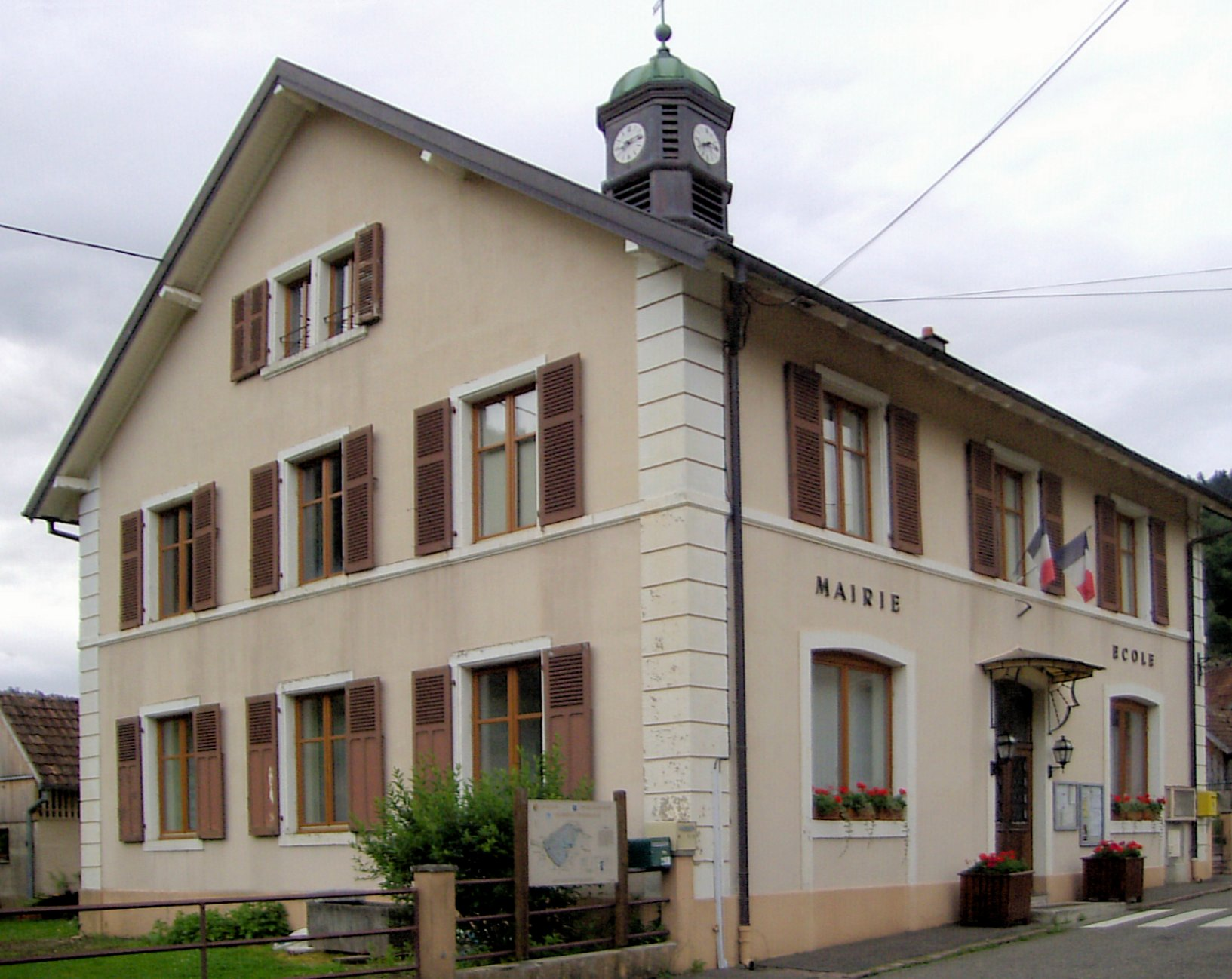 La mairie-école de Storckensohn